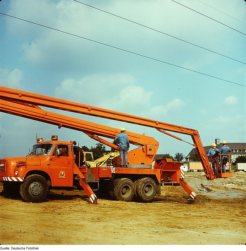 Original image description from the Deutsche Fotothek Elektromonteur